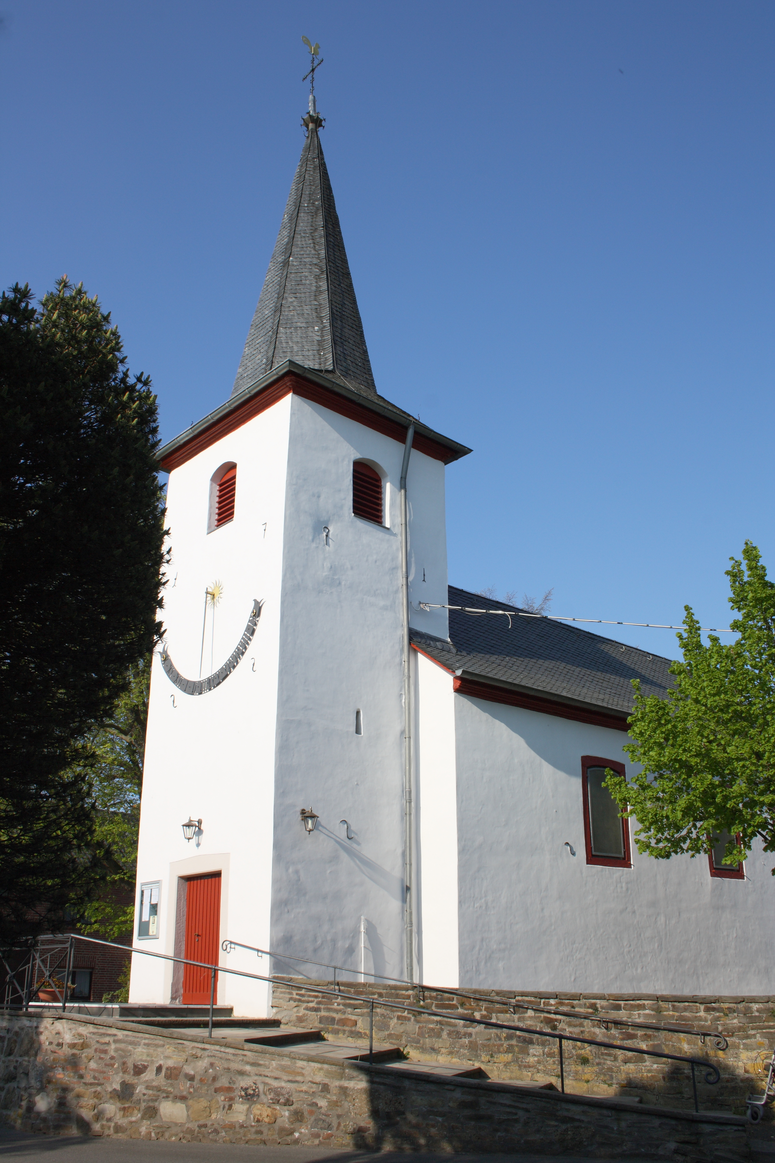 Katholische Pfarrkirche St. Antonius in Niederdrees, einem Stadtteil von Rheinbach